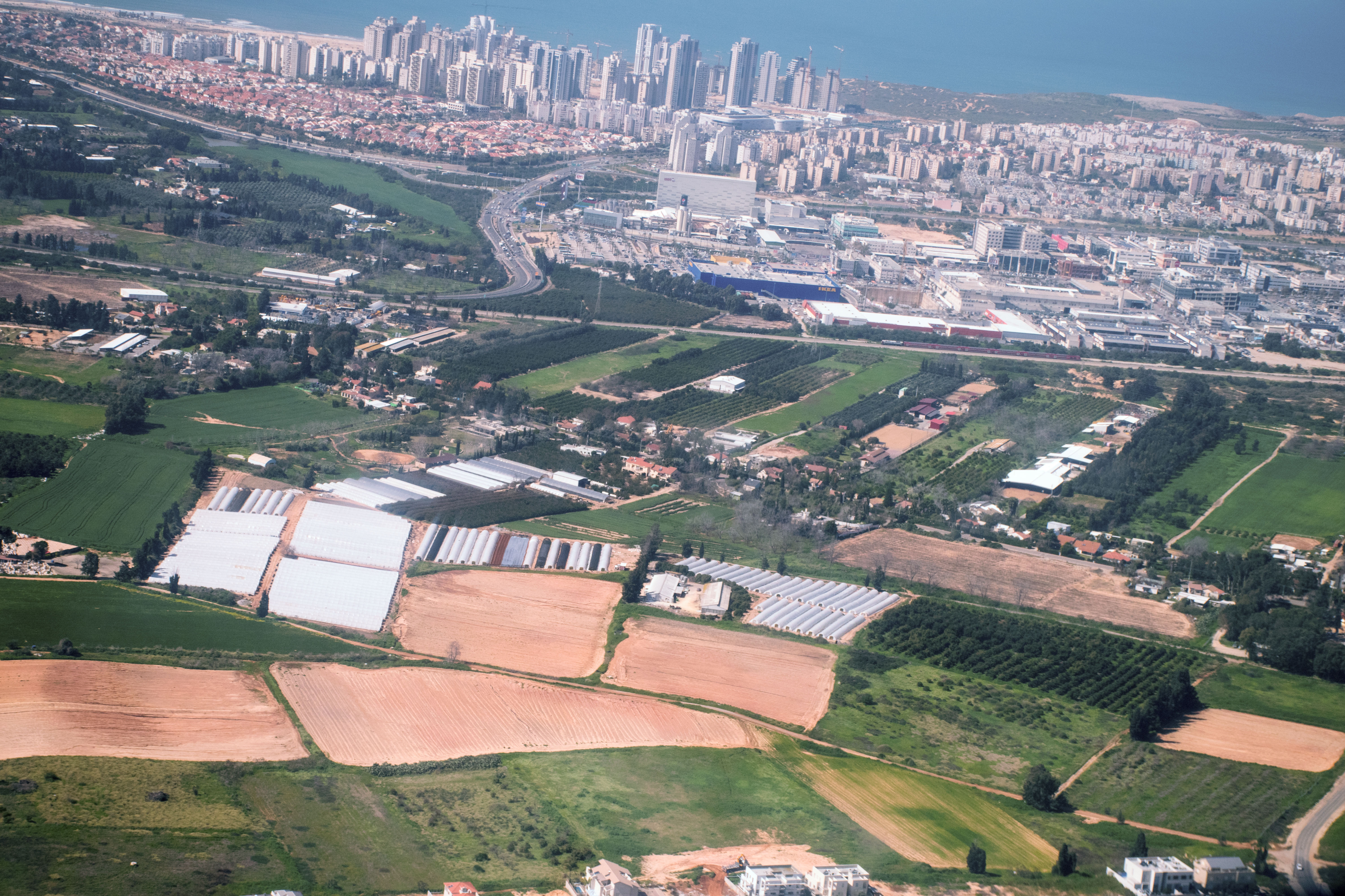 צילום אויר איזור תעשיה חדש נתניה